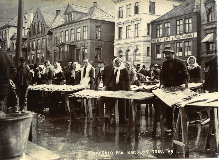 Ukjent fotograf og år. Fra arkivet etter Narvesen (Arkivref.: PA1522Ua14_037).